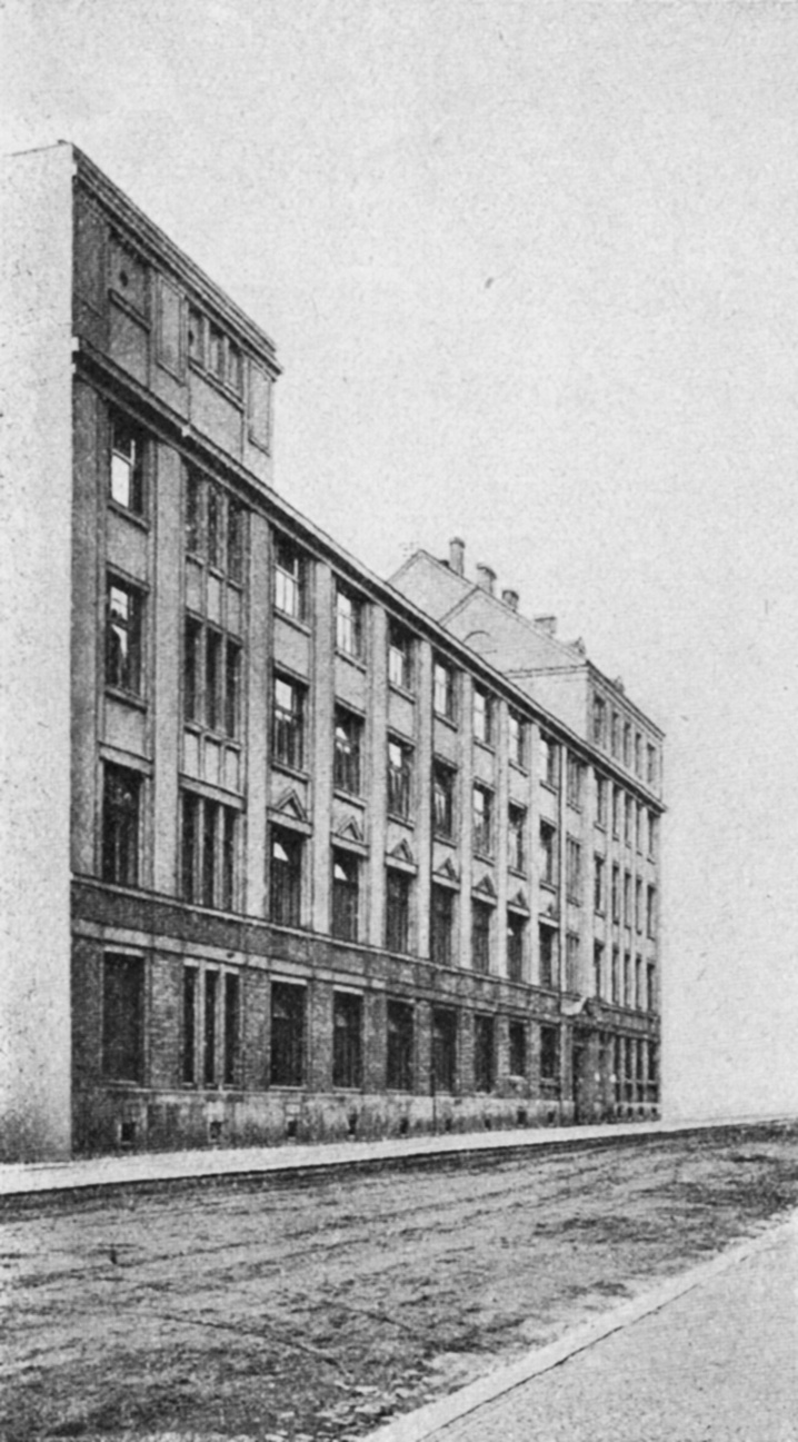 Obr. 10. Průmyslová tiskárna na Letné. (původní titulek), Praha 8 - Holešovice, dům čp. 1278, Dobrovského 25 - 27.